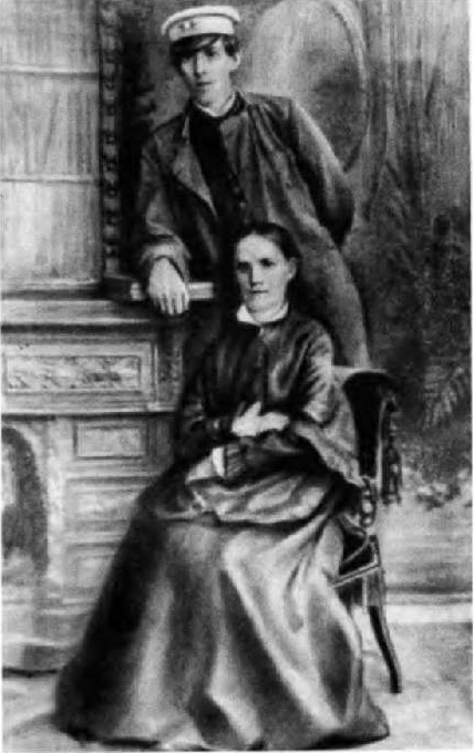 Владимир Наркиссович Мамин (1863, Пермская губерния — 28 декабря 1909, Екатеринбург) — юрист, депутат II Государственной думы Российской империи от Пермской губернии (1907); брат писателя Д. Н. Мамина-Сибиряка.